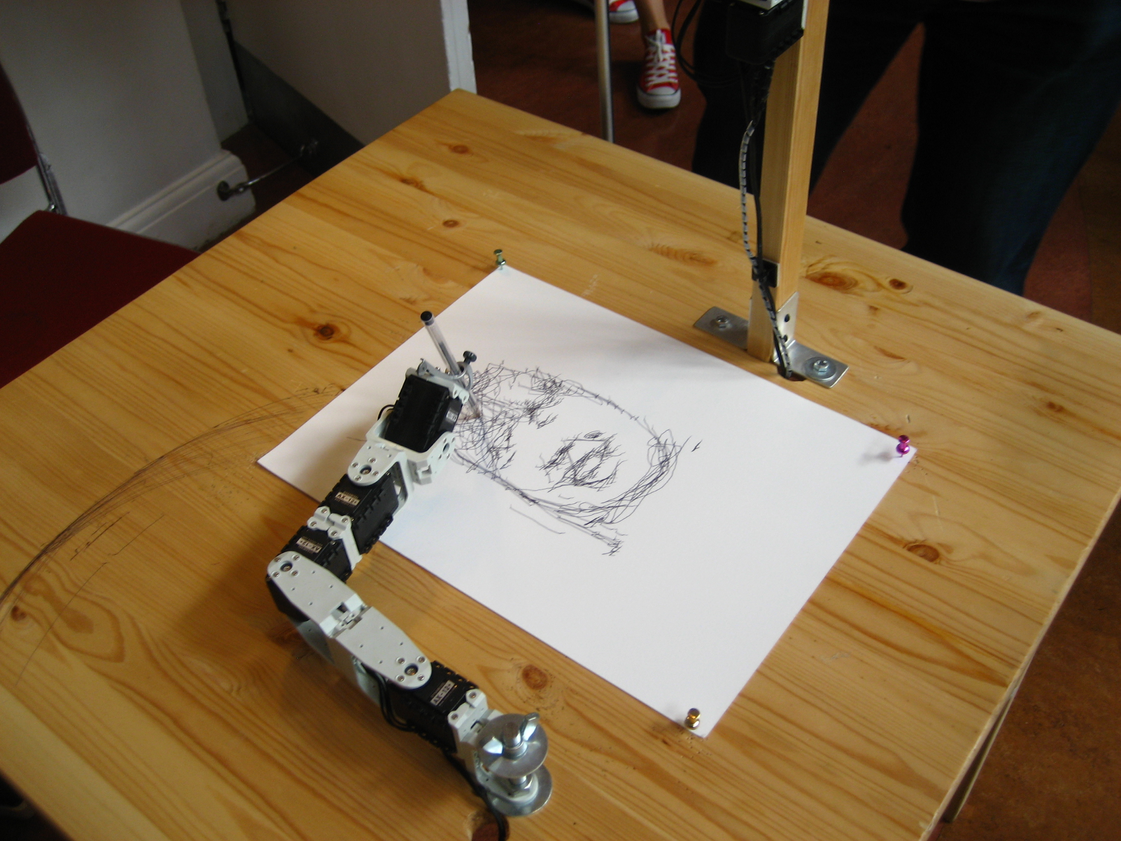 Robot drawing